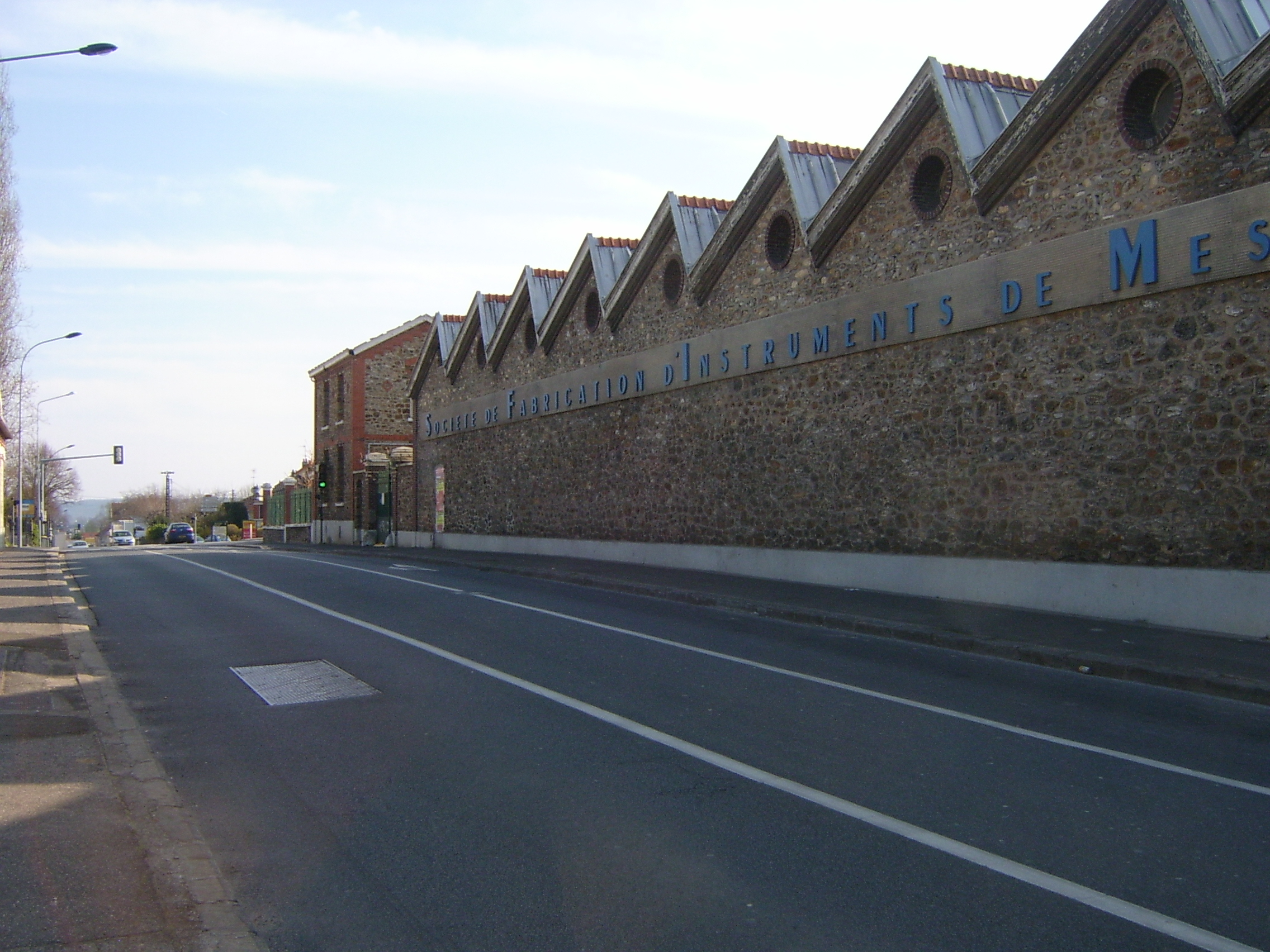 Photo personnelle prise par Kerlidec